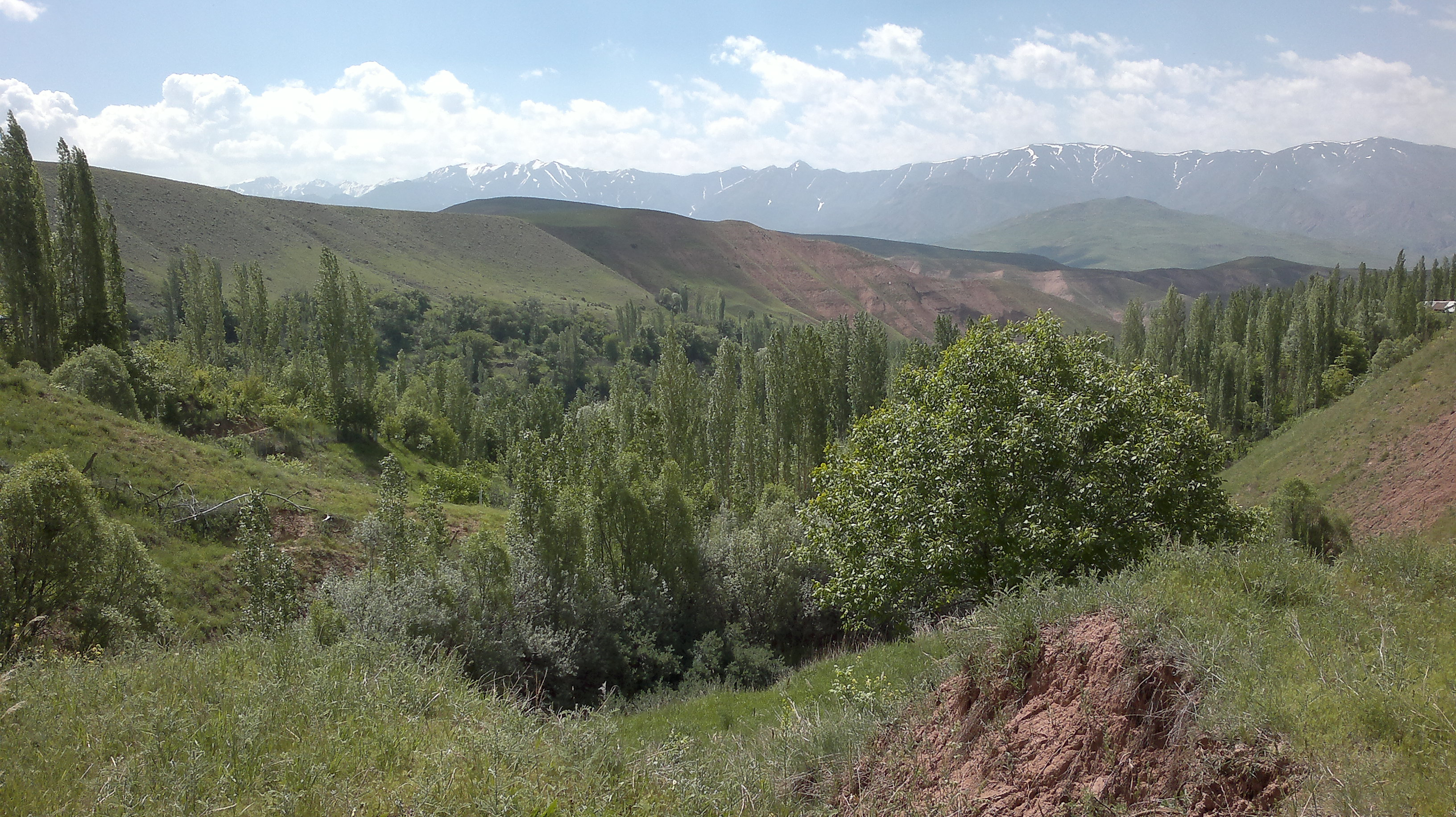 جزینان